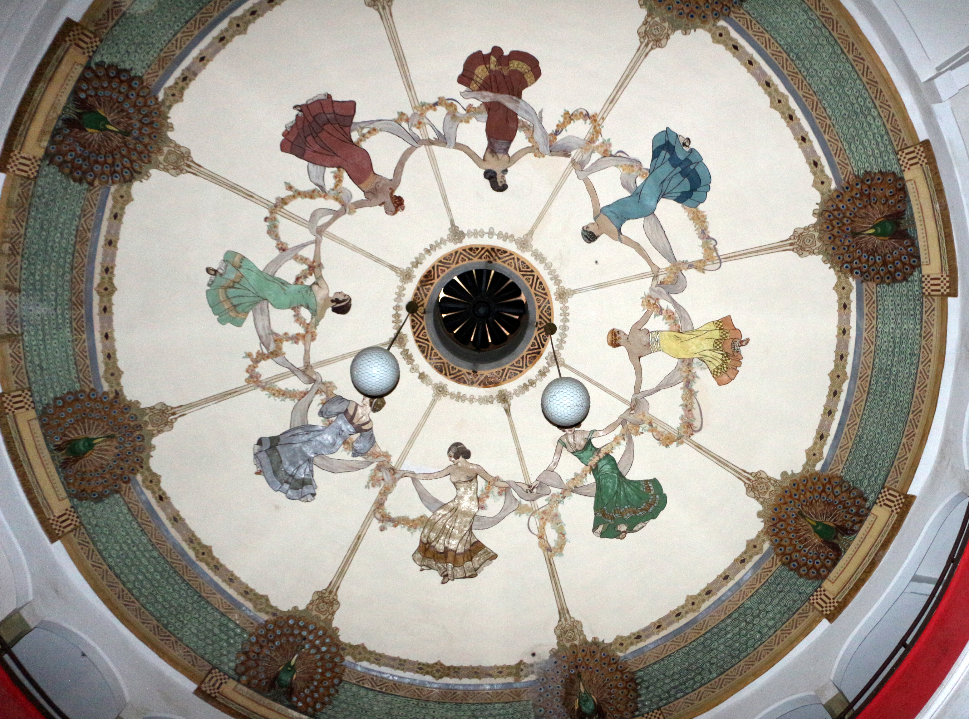 Asmara, teatro d'opera, sala 04.JPG